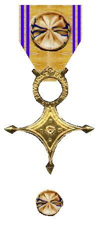 Eigen tekening